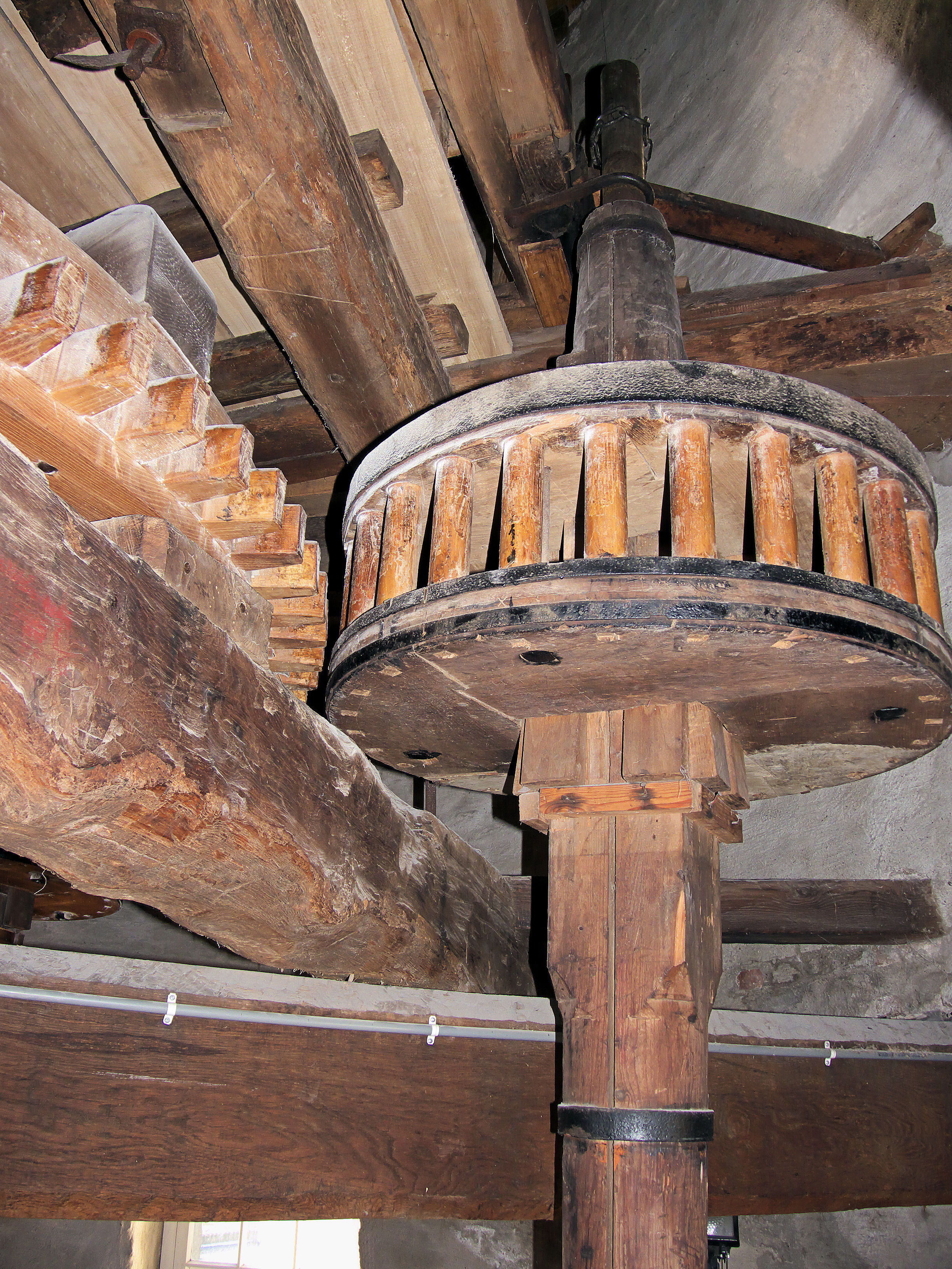 Molen De Kroon Arnhem maalkoppel Bentheimer zandsteen steenrondsel